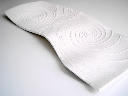 Lidia Boševski: "Wave", 2006. godine, white clay, 60x22 cm